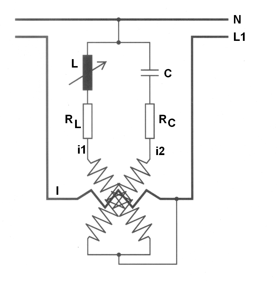 Kereszttekercses fázistényező mérő elvi kapcsolása